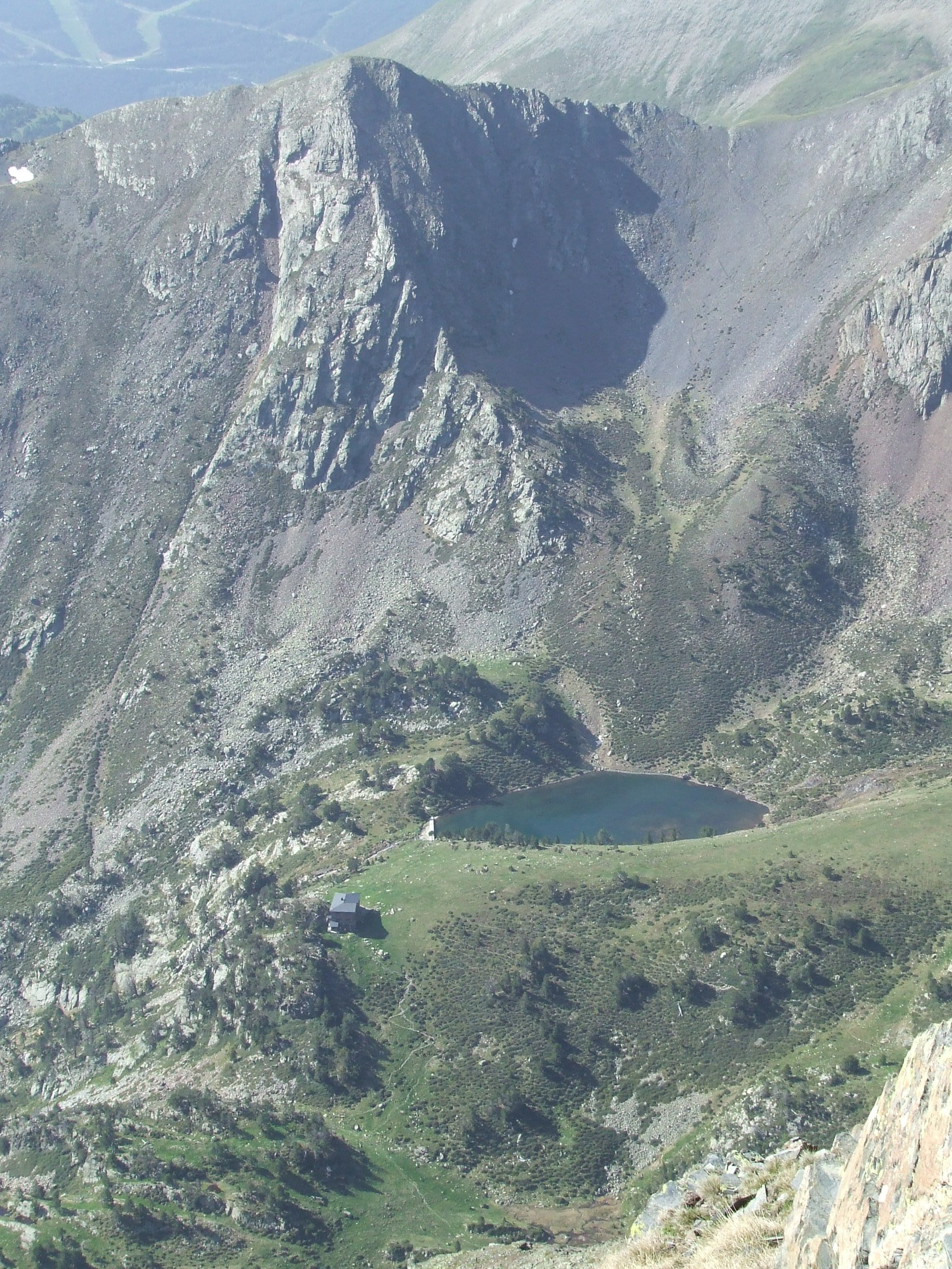 Refugi de Coma Pedrosa, Estany de les Truites & Pic Dels Aspres. Taken from Coma Pedrosa